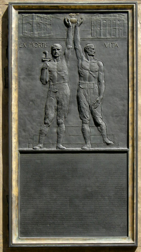 Palazzo Ricci-Altoviti 04 targa